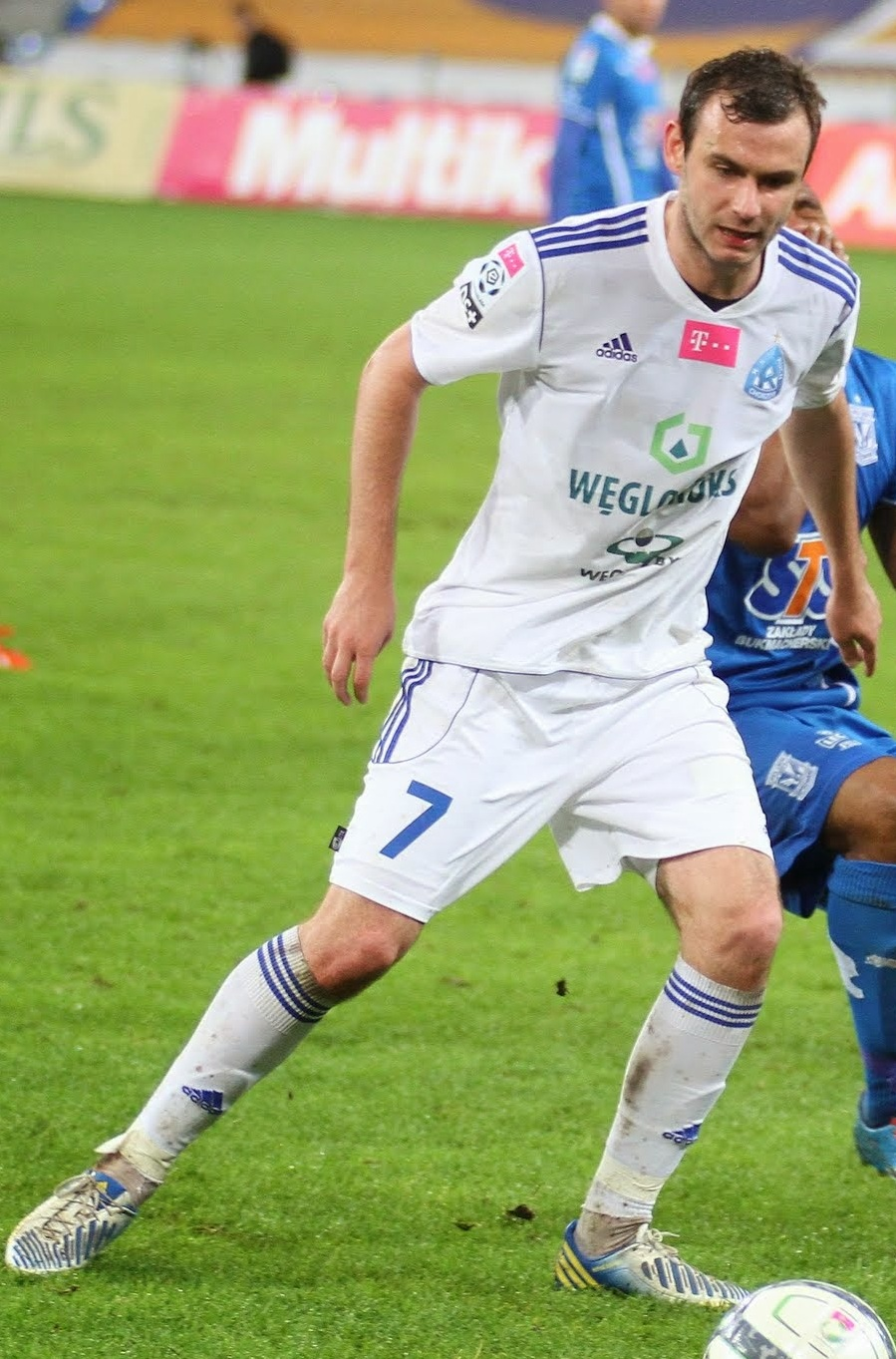 Filip Starzyński w barwach Ruchu Chorzów